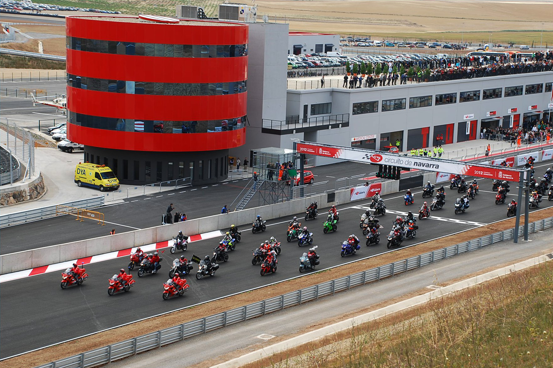 Circuito de Navarra el día de su inaguración.